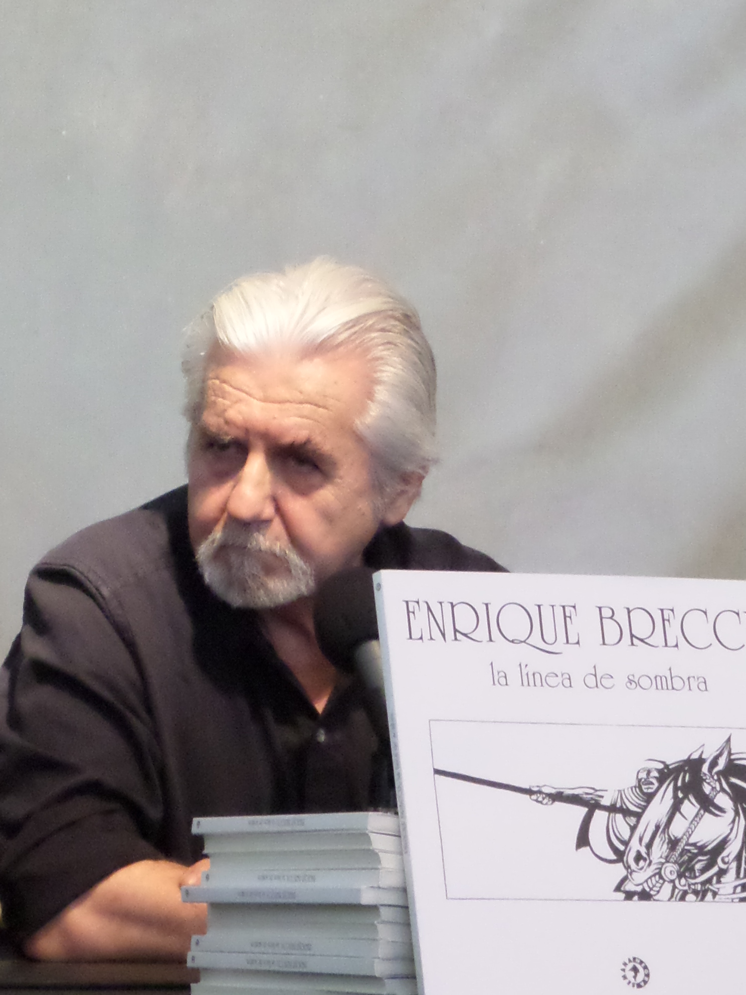 Enrique Breccia. Opera propria di Massimiliano Purinan, foto scattata personalmente all'artista, licenza d'uso libera da copyright